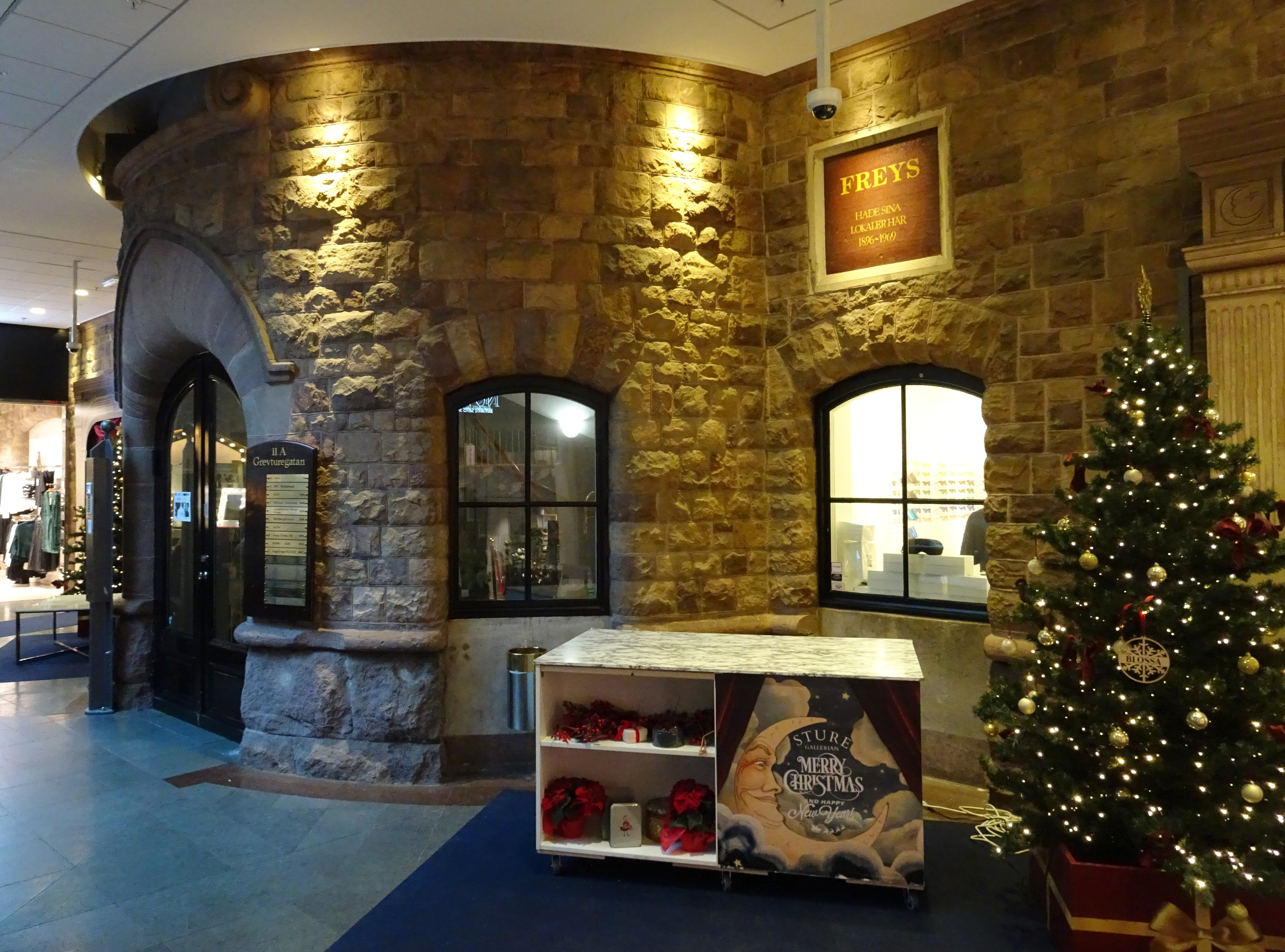 Gamla entrén från Grev Turegatan 11 till Freys Hyrverk (idag Sturegallerian)